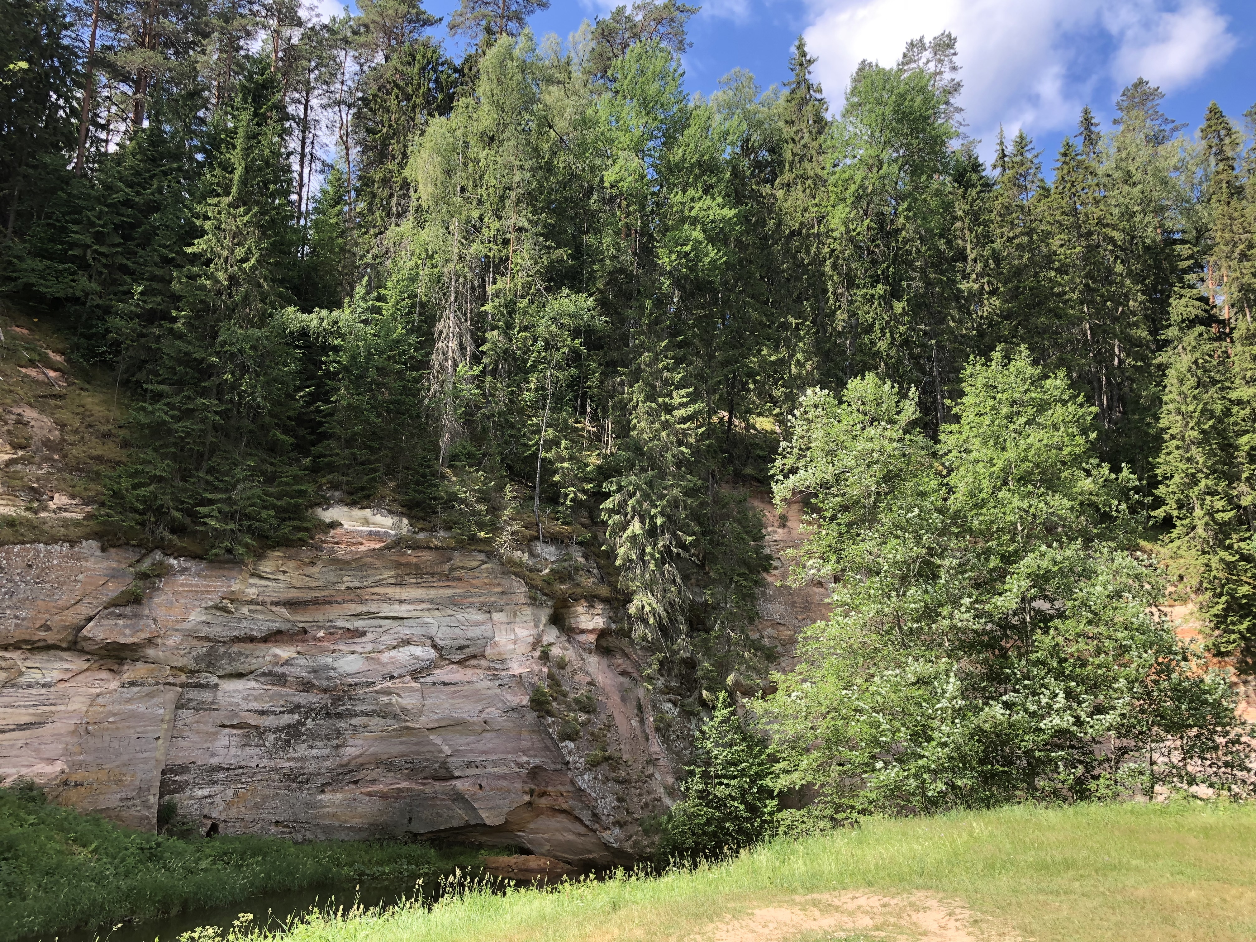 Suur Taevaskoda 2019